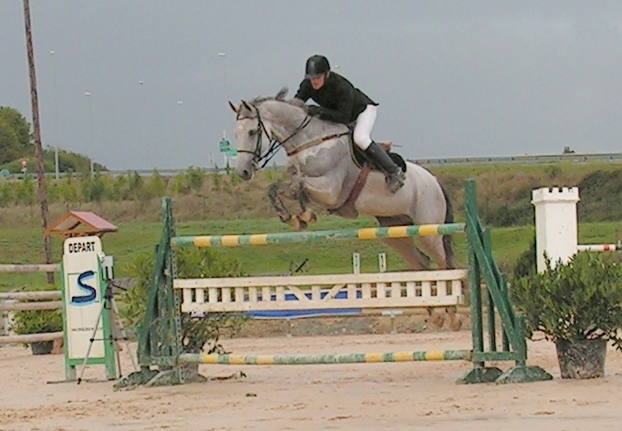 Grand Prix Pro2 à Niort (France) Date : Septembre 2006 Auteur : Karlyne